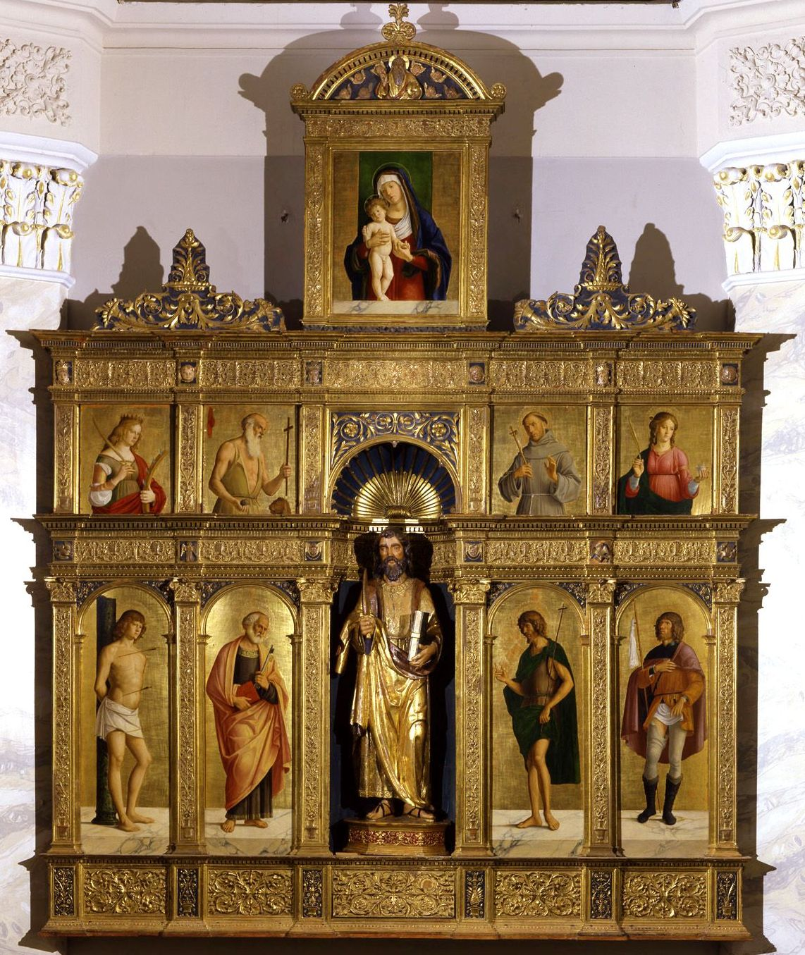 Pollitico